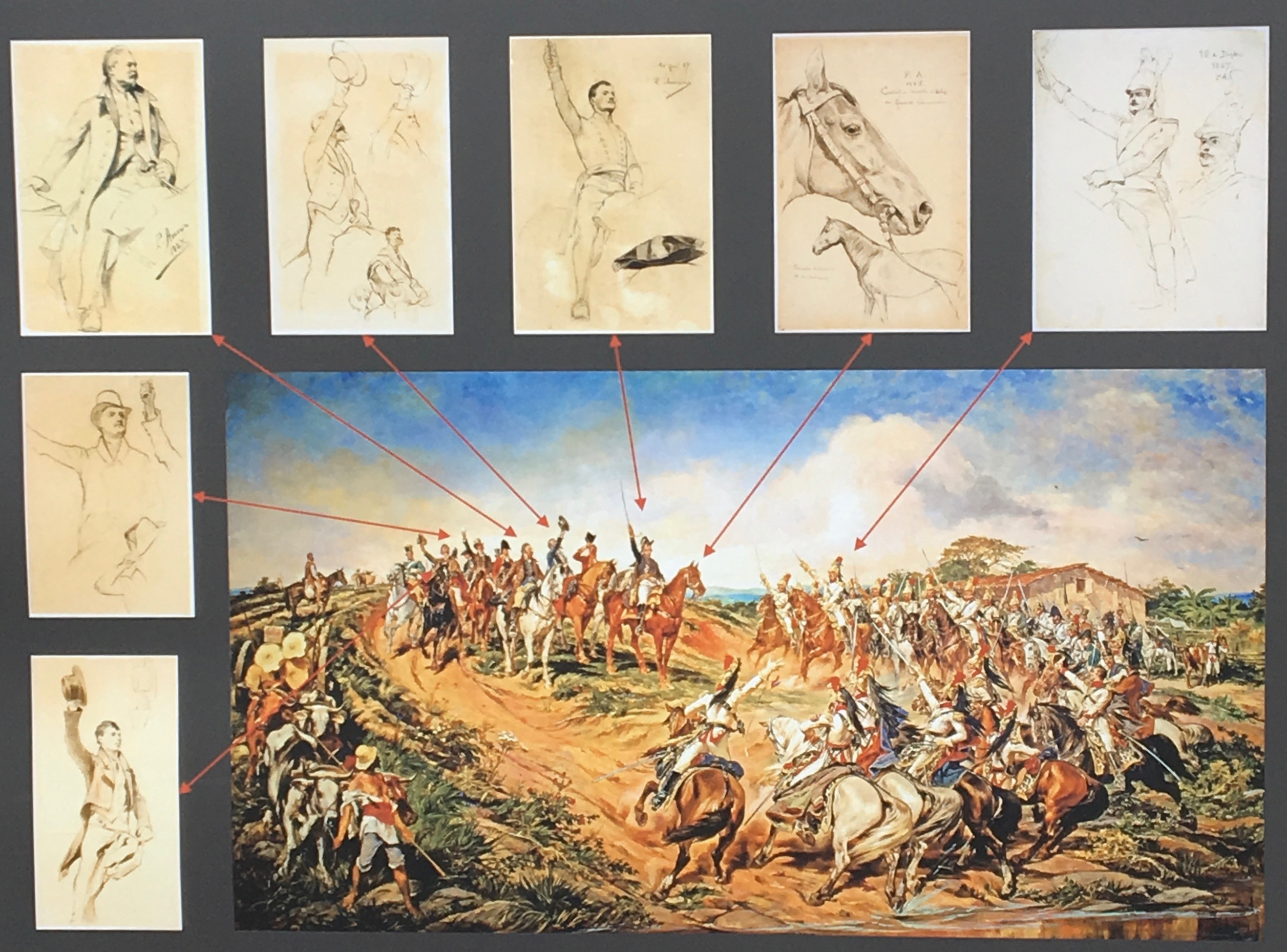 x